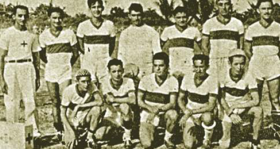 Primeiro time do Atlético Acreano - Campeão Estadual